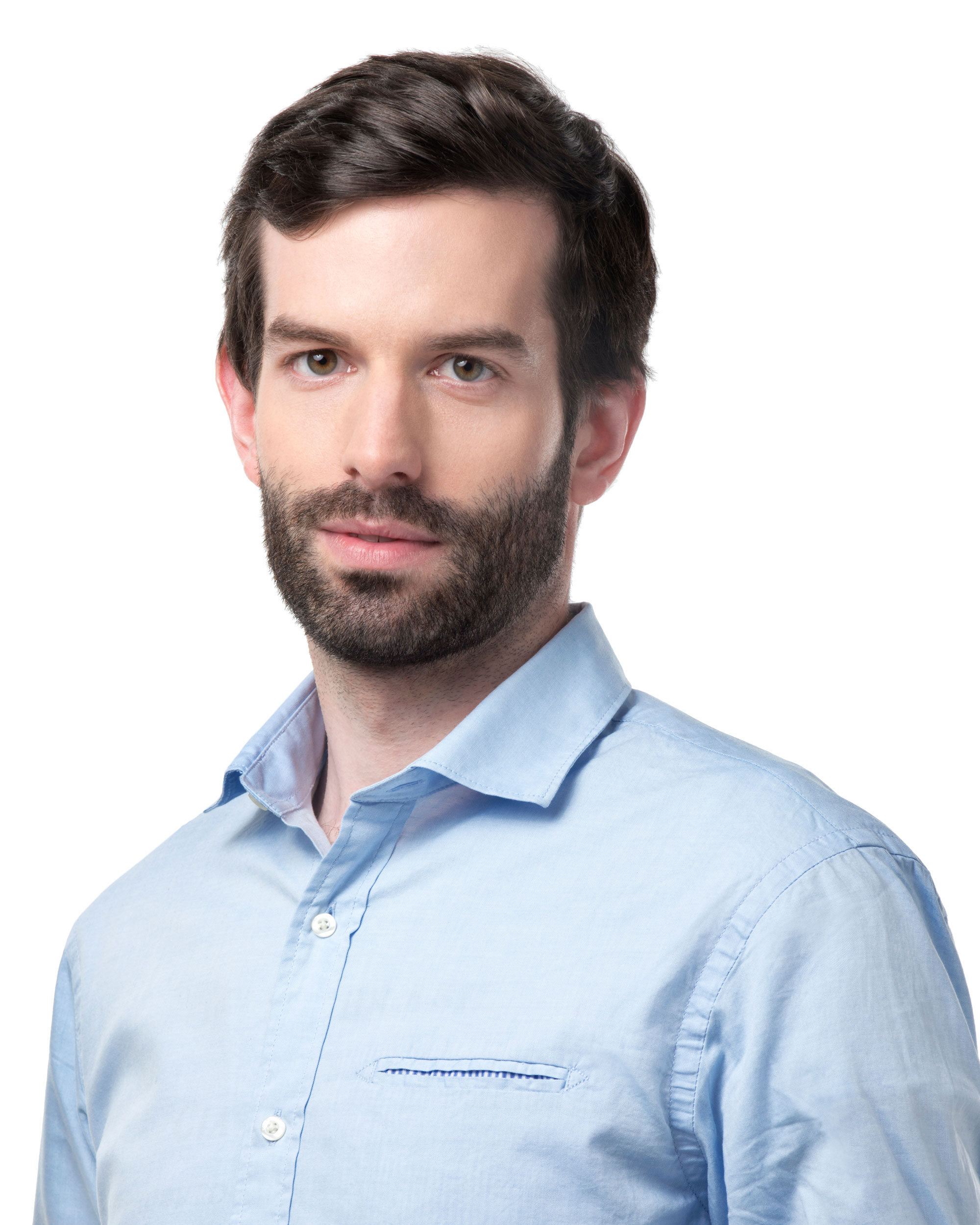 Fekete-Győr András 2017-ben.